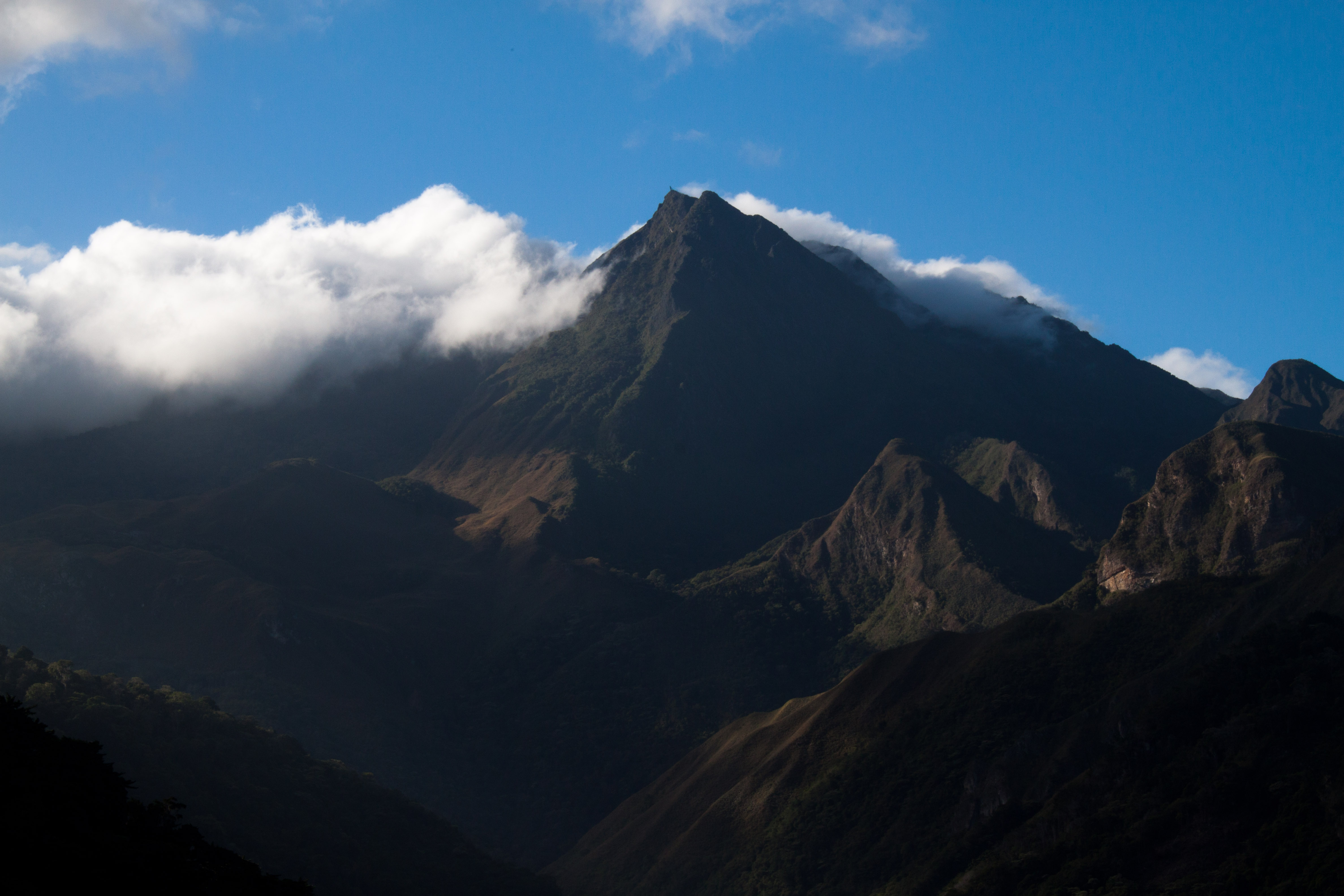 Parque Nacional Alejandro Humbolt